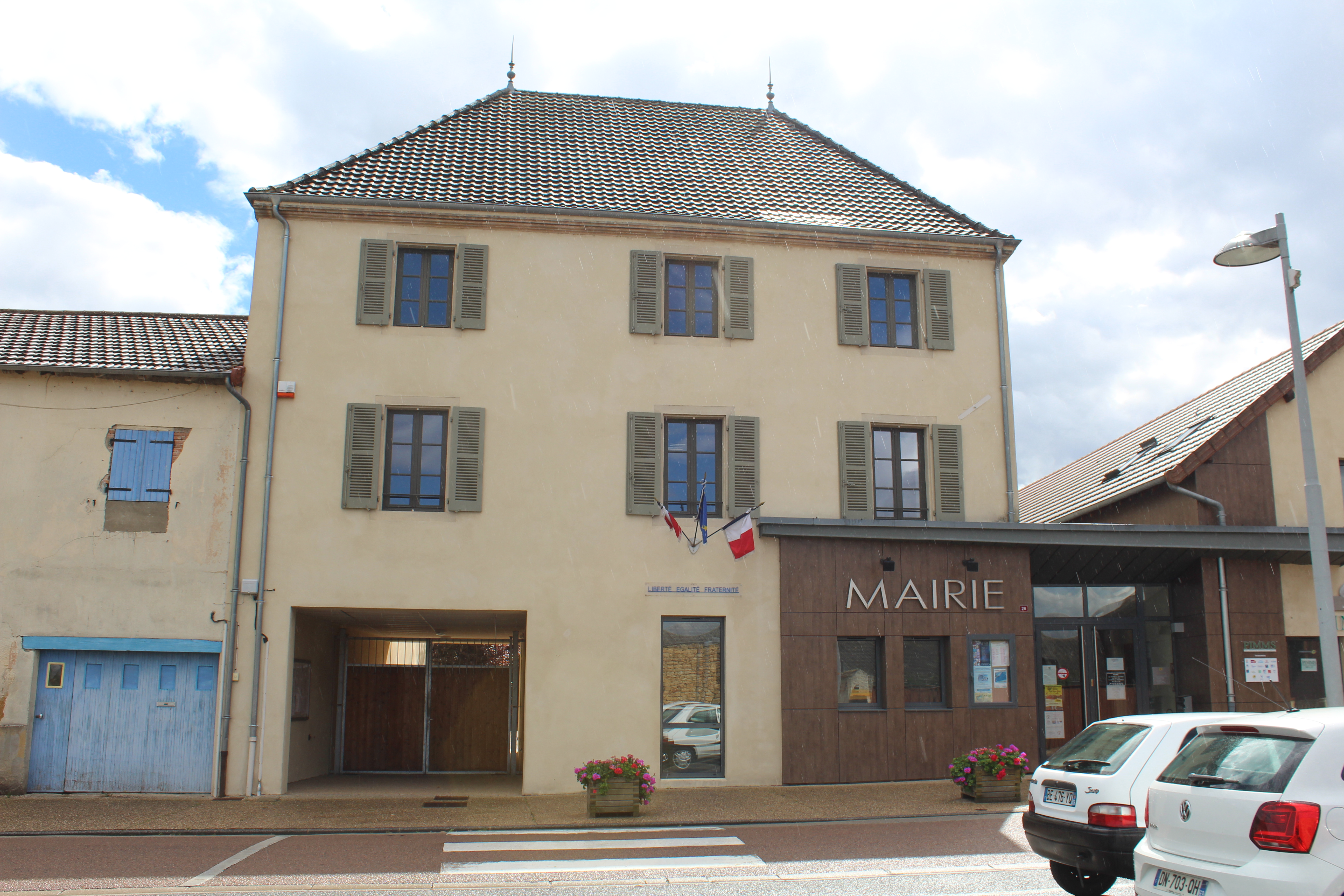 Mairie de Melay, Saône-et-Loire.